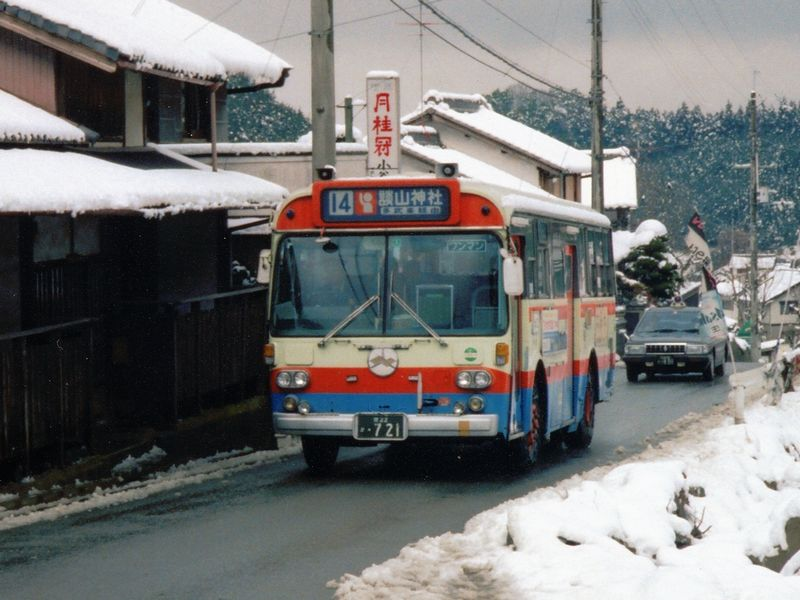 Nara Kotsu 721 Isuzu K-ECM430 at Sakurai City